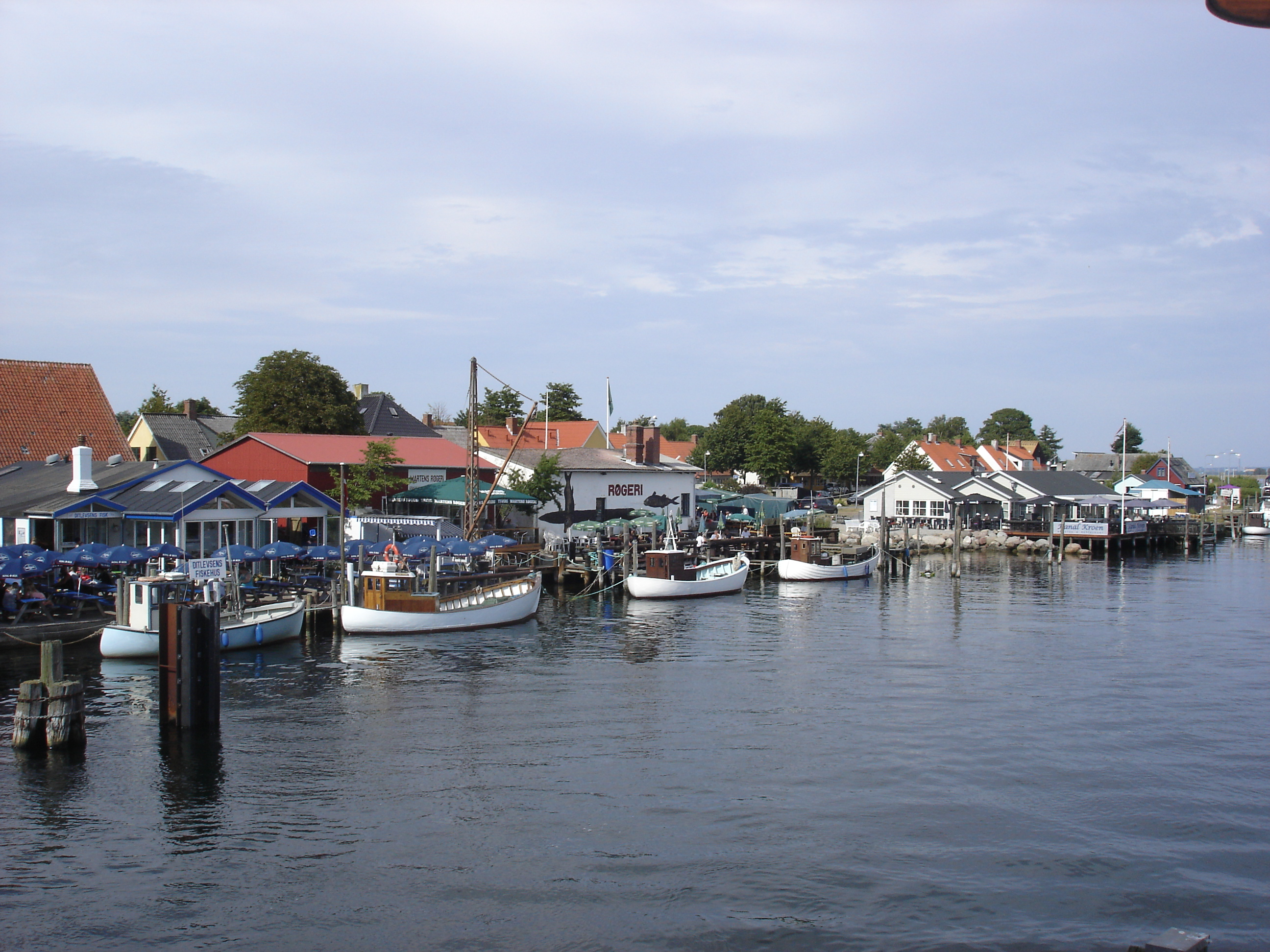 Karrebæksminde Havn langs kanalen